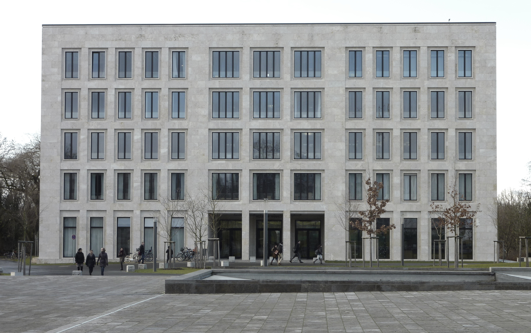 Stadt Frankfurt am Main, Johann-Wolfgang-von-Goethe-Universität: Ansicht des Uni-Campus Westend im Stadtteil Westend-Nord. Das Foto zeigt die Ostfassade des von 2004 bis 2008 errichteten House of Finance (Architekten: Kleihues+Kleihues, Berlin) an der Westseite des Campusplatzes. Ansicht von Osten.